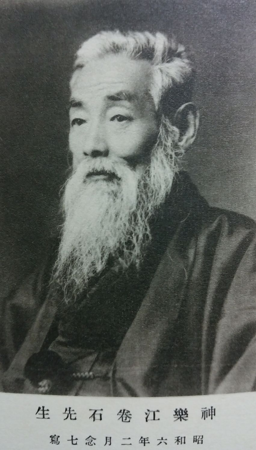 卷石道人画譜掲載